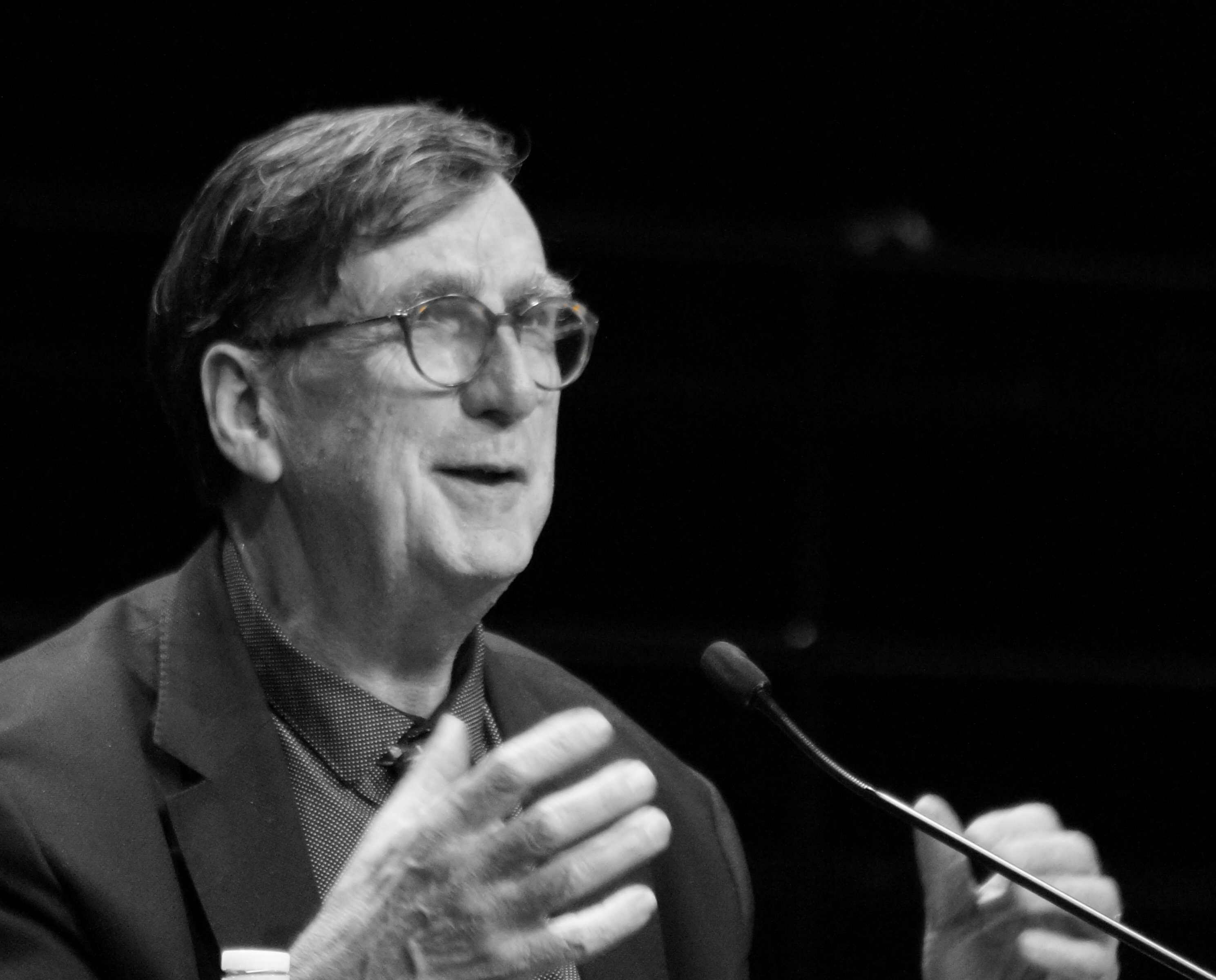 Conférence théâtrale l'anthropocène.